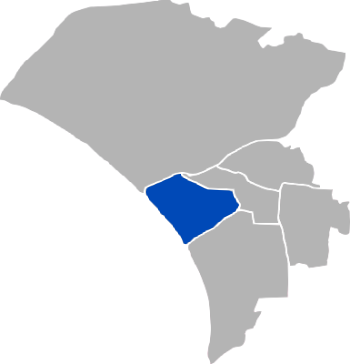 臺南市安平區。